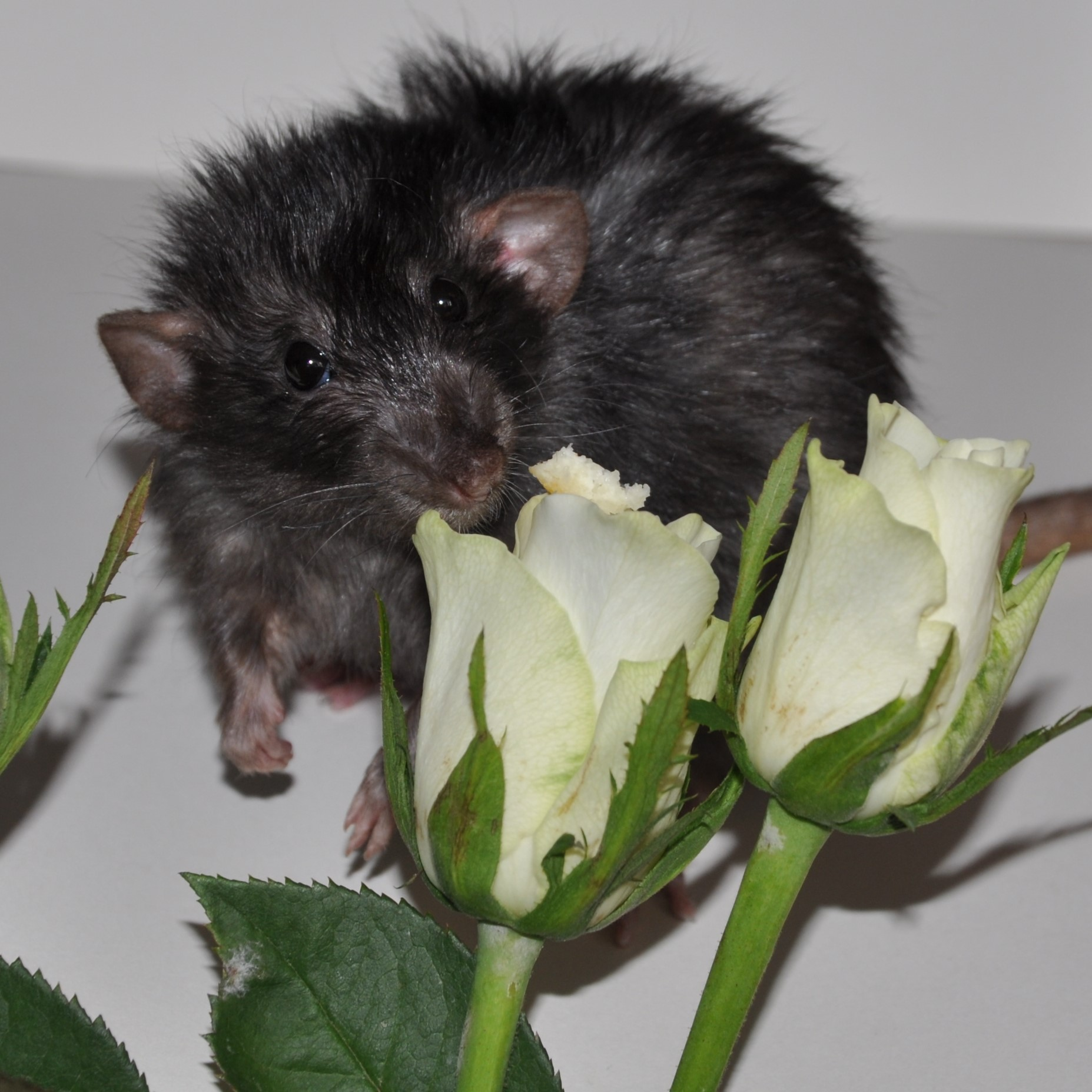 Чиполлета Сибирская (Black Self Dumbo Longhair)